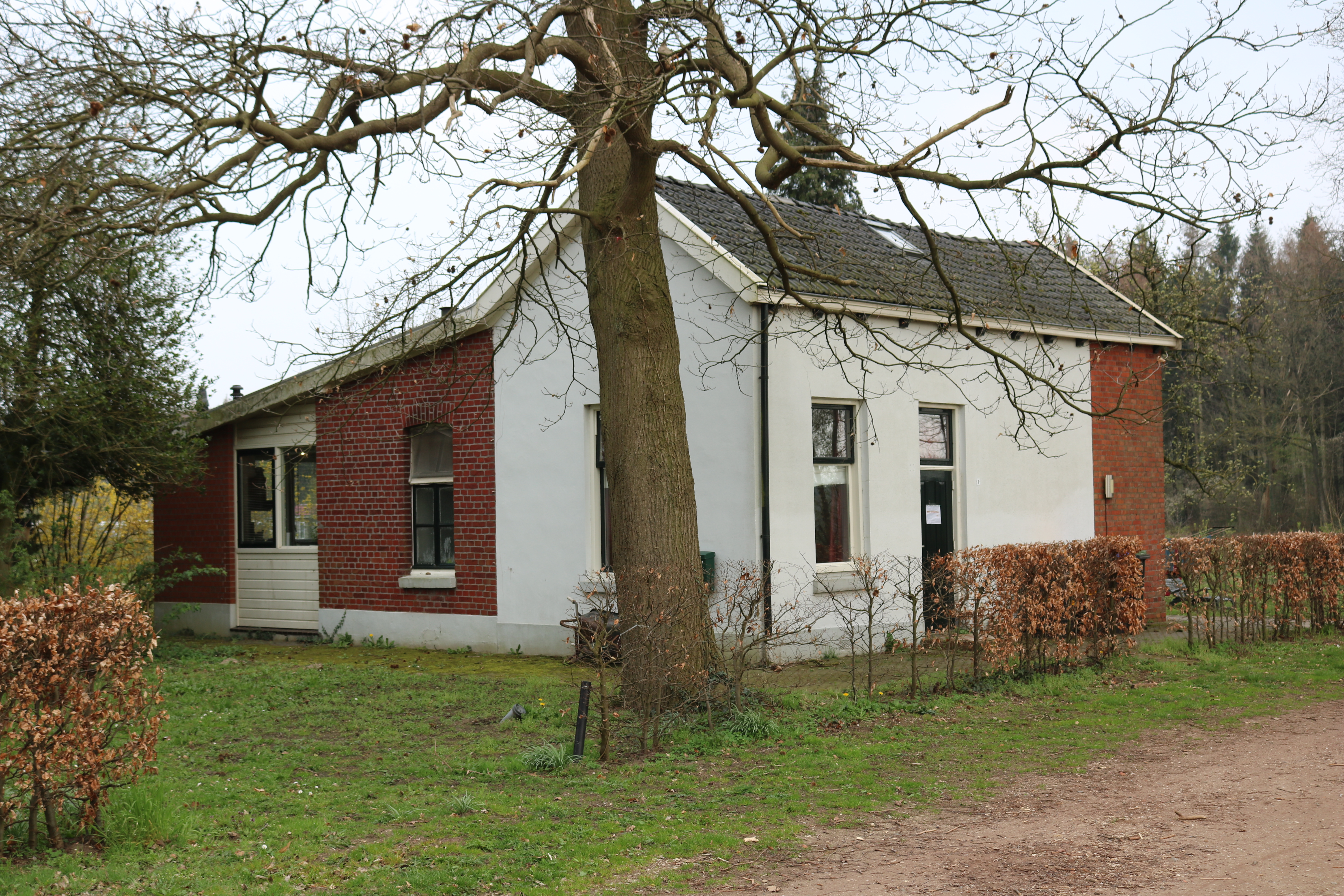 Winterswijk, wachterswoning aan de De Slingeweg (Foto: Daniel van der Ree, 6 april 2019)